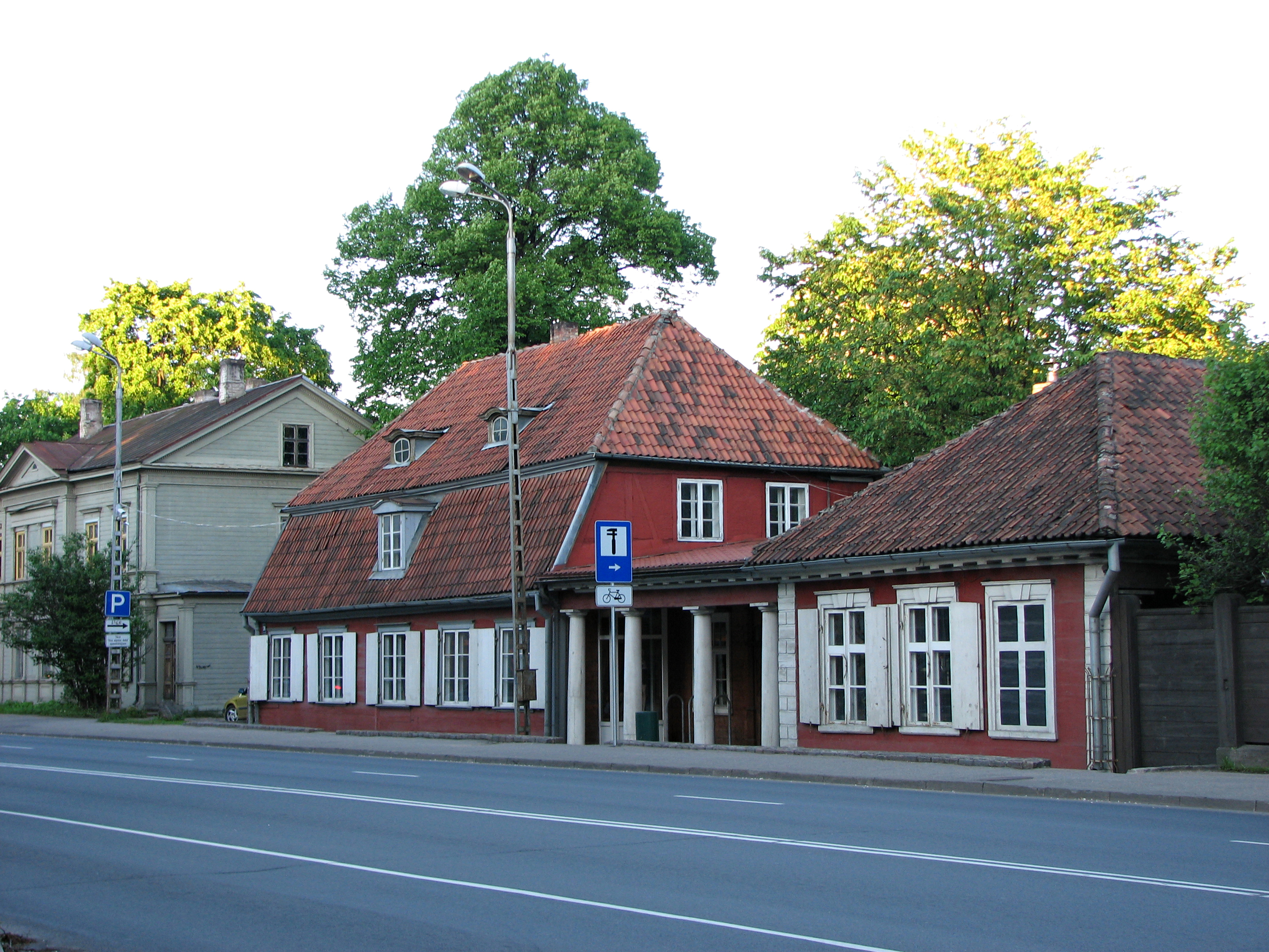 Āgenskalns, Zemgale Suburb, Riga, Latvia